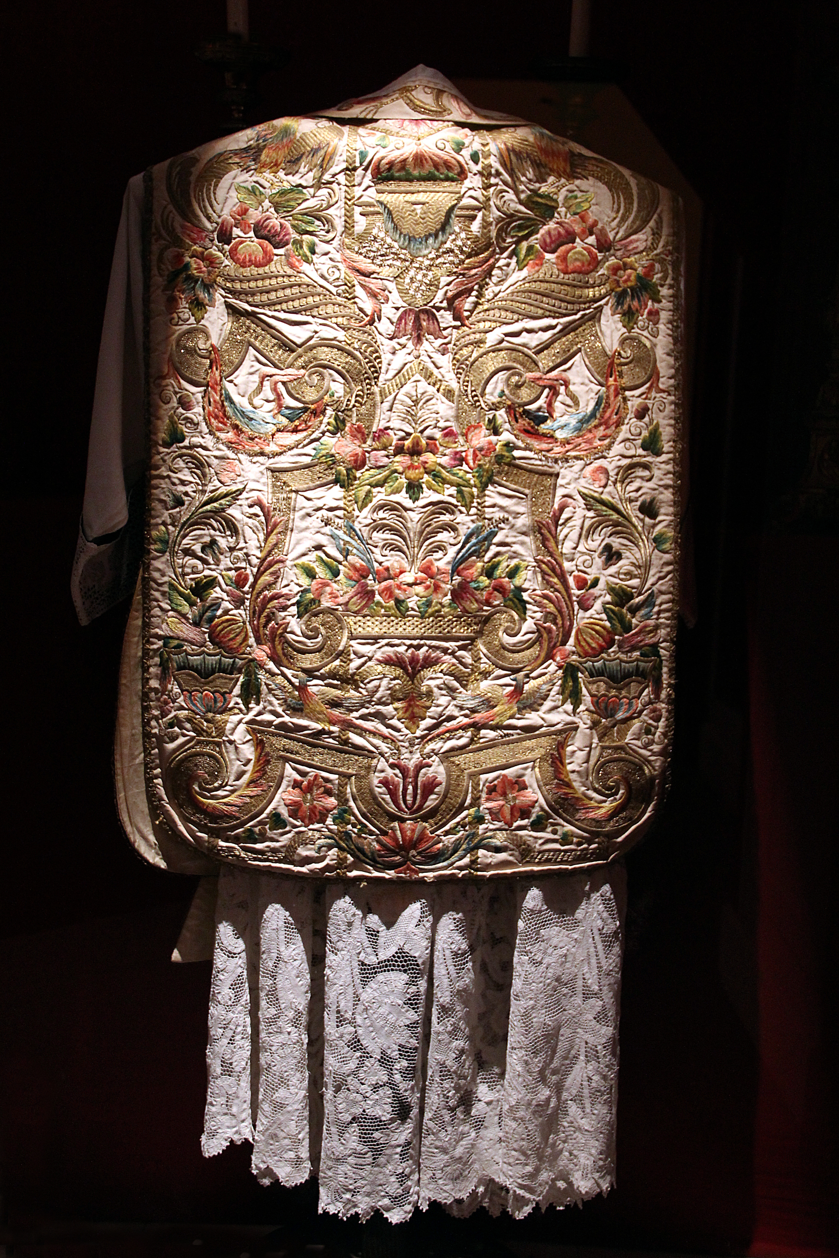 Chasuble brodée du XVIIe siècle faisant partie des collections du château de Vaux-le-Vicomte - Maincy (Seine-et-Marne, France).